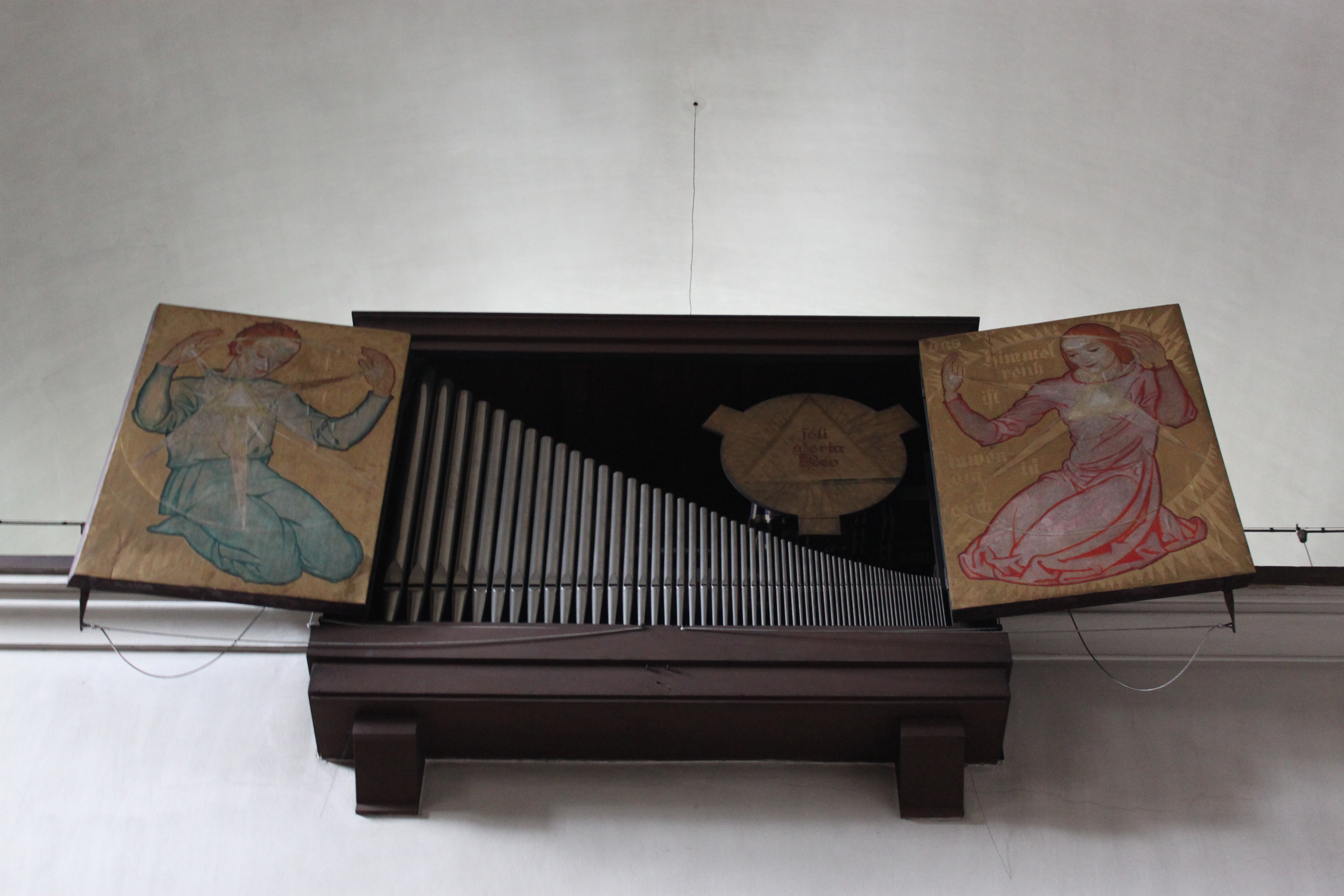 Nahaufnahme des Positivs der Orgel der Pfarrkirche Alt-Ottakring, errichtet 1935-1938 von Josef Mertin und Wilhelm Zika